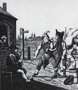 Hebel-Illustration zwischen 1827 - 1833